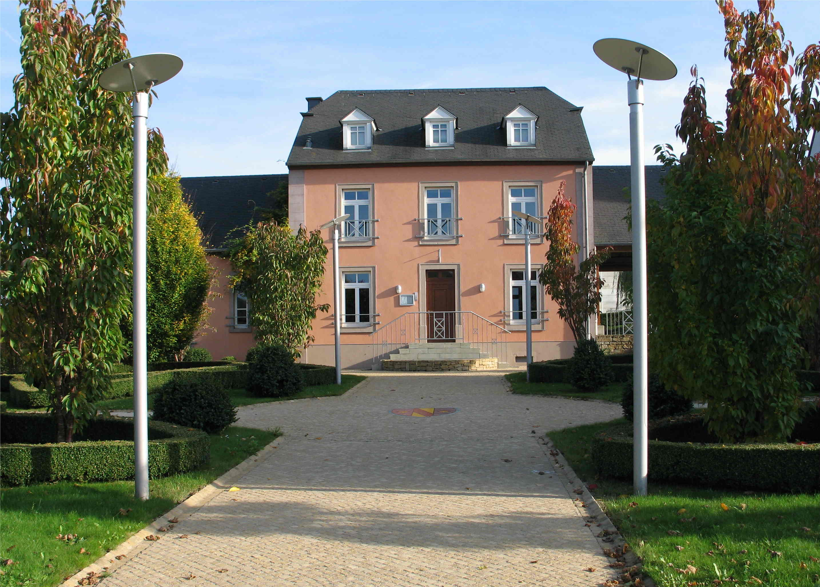 La maison communale de Vichten (Luxembourg)